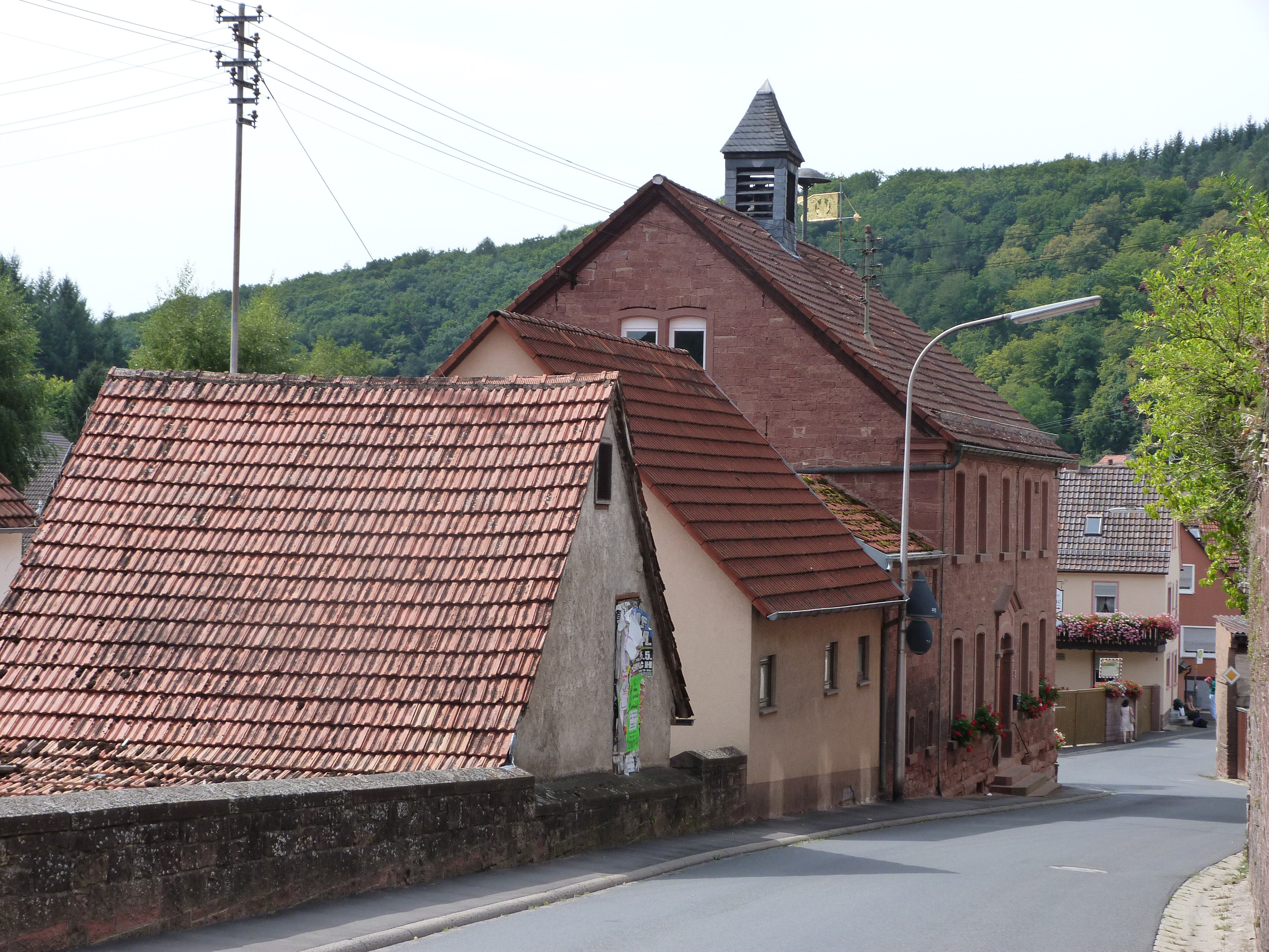 Rathaus von Holzkirchen, Unterfranken (Rückseite)